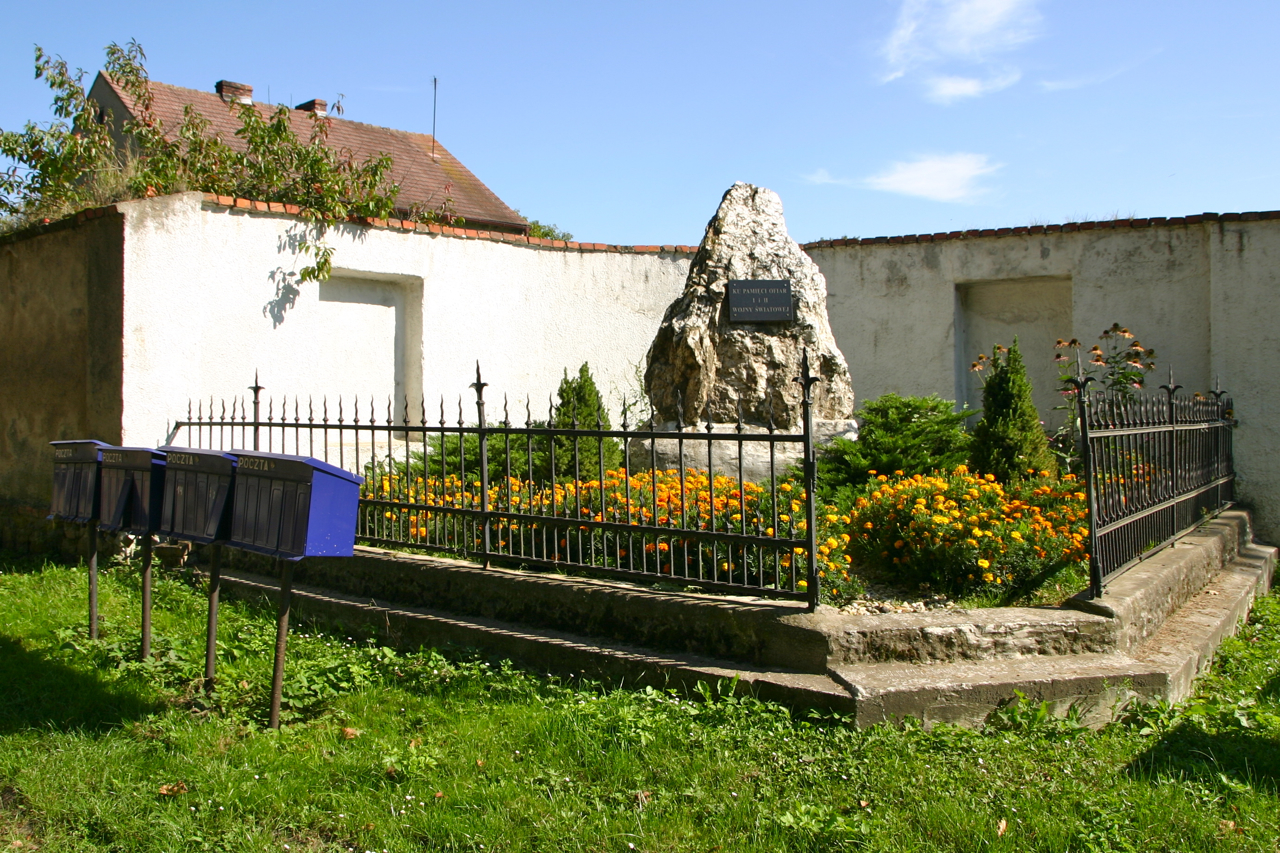 Słoków – wieś w Polsce położona w województwie opolskim, w powiecie prudnickim, w gminie Lubrza.